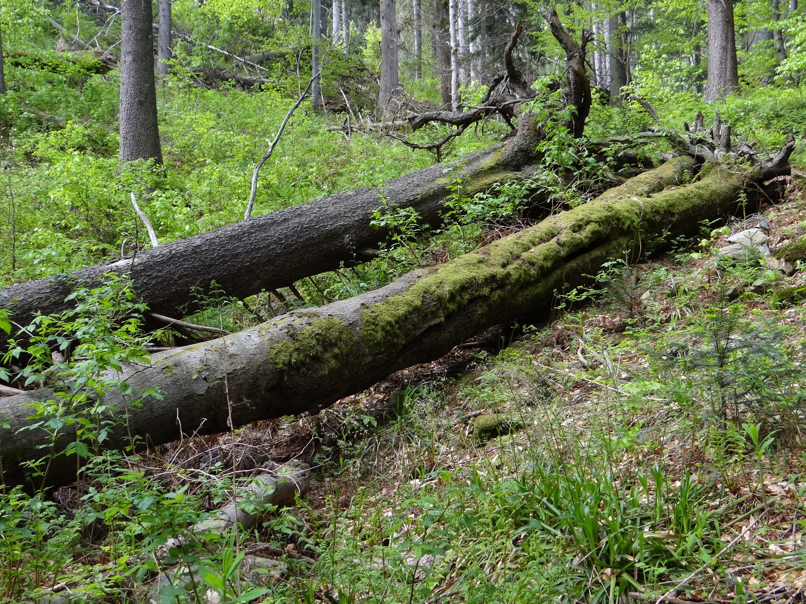 Górny Płaj w Babiogórskim Parku Narodowym